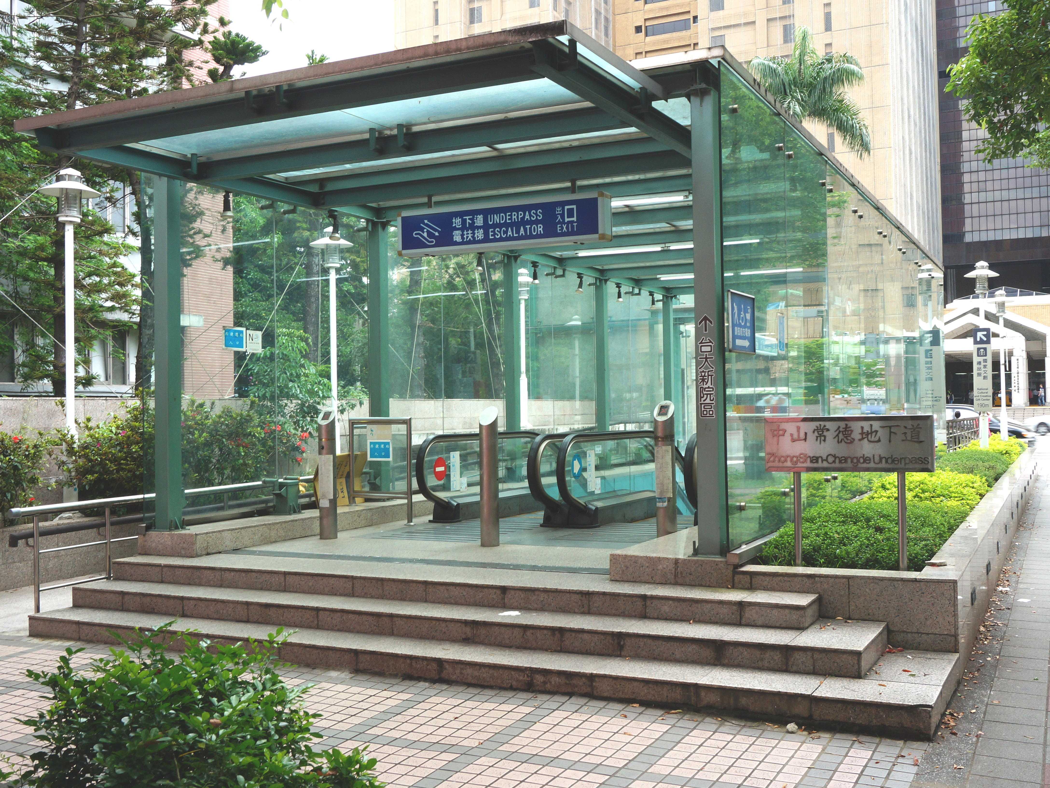 貫穿臺北市中山南路的中山常德地下道，往臺大醫院東院區方向入口。